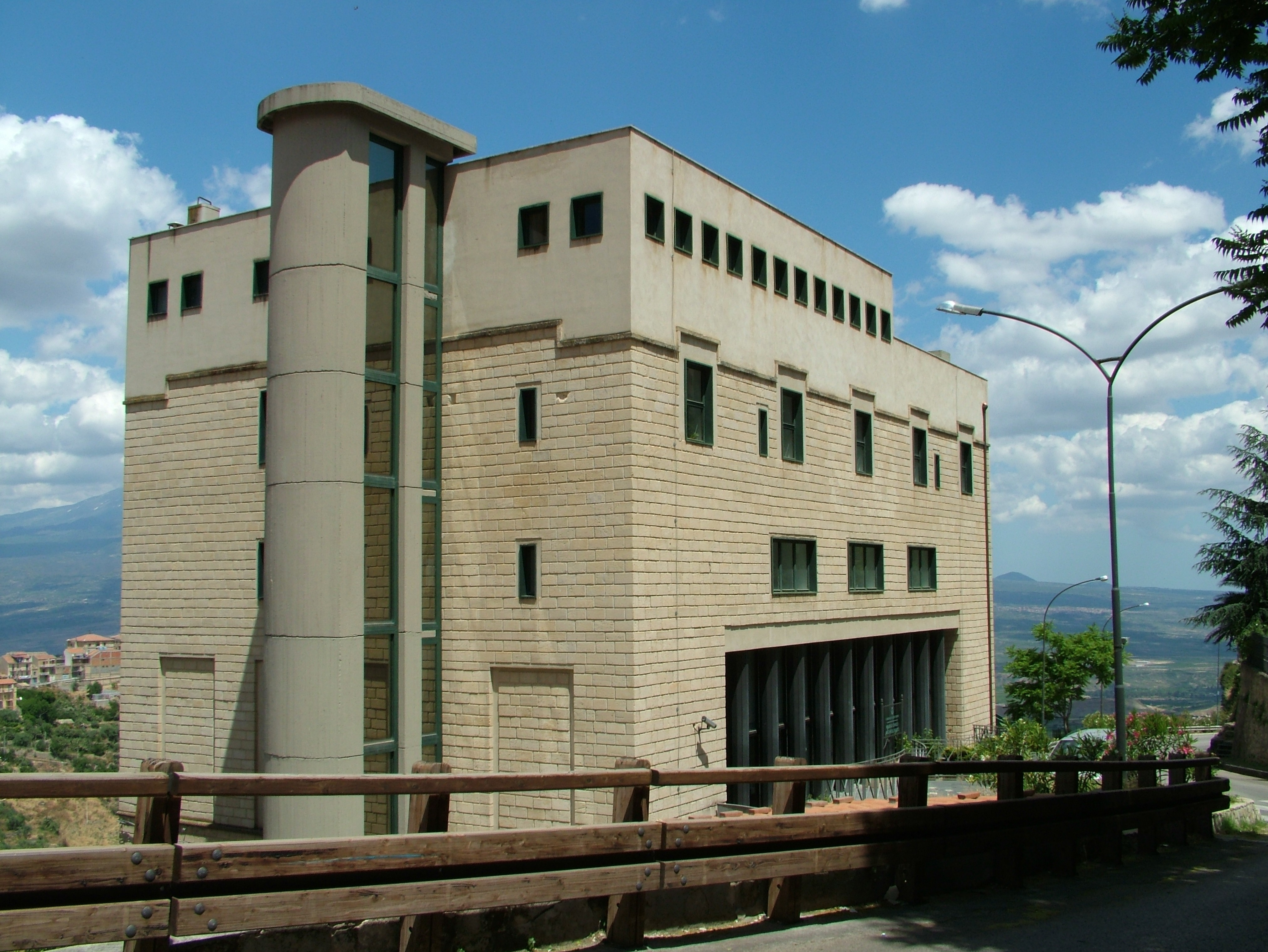 Centuripe, Provinz Enna, Sizilien, das Archäologische Museum